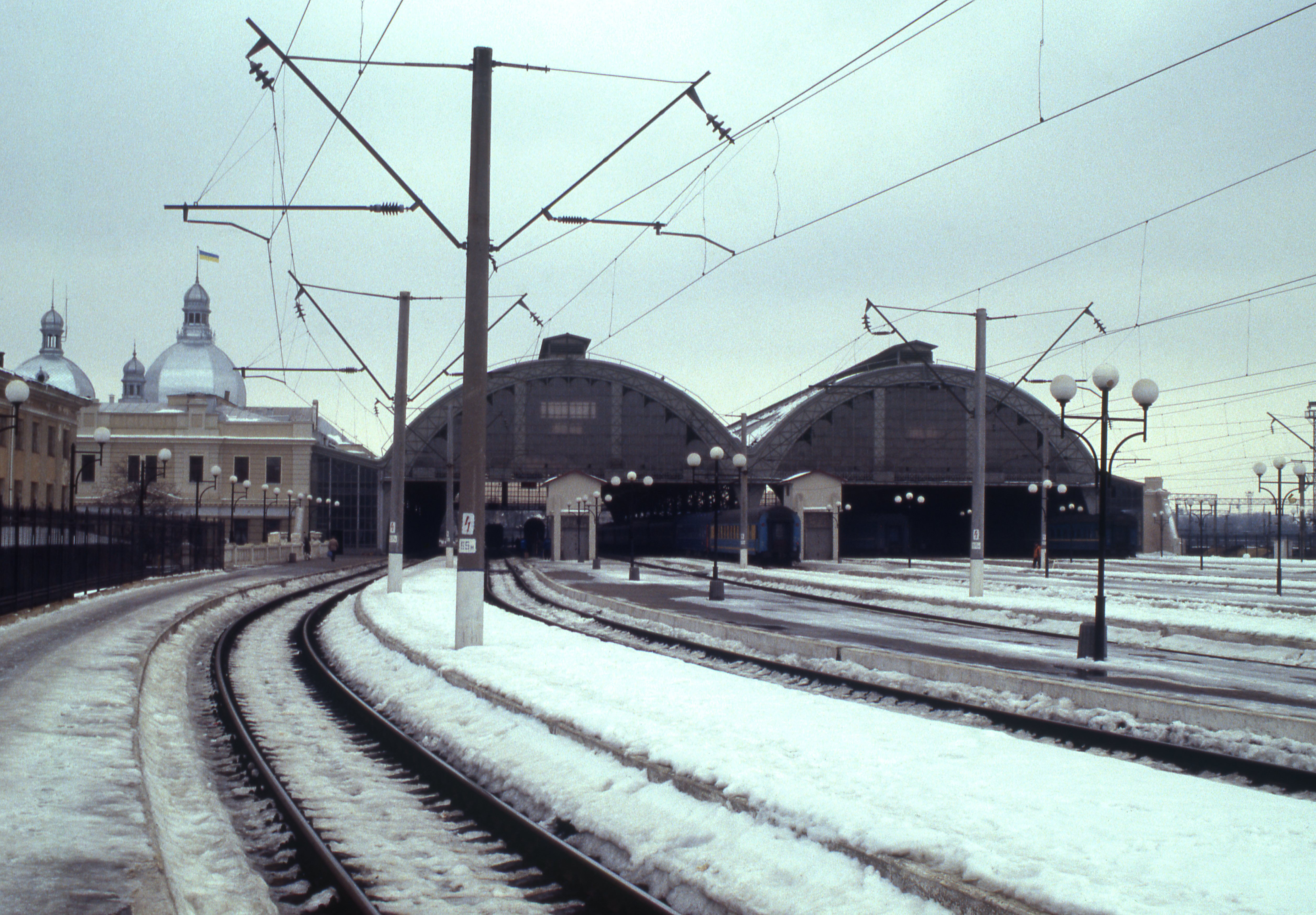 Vanaf de sporen een zicht op het hoofdstation in Lviv